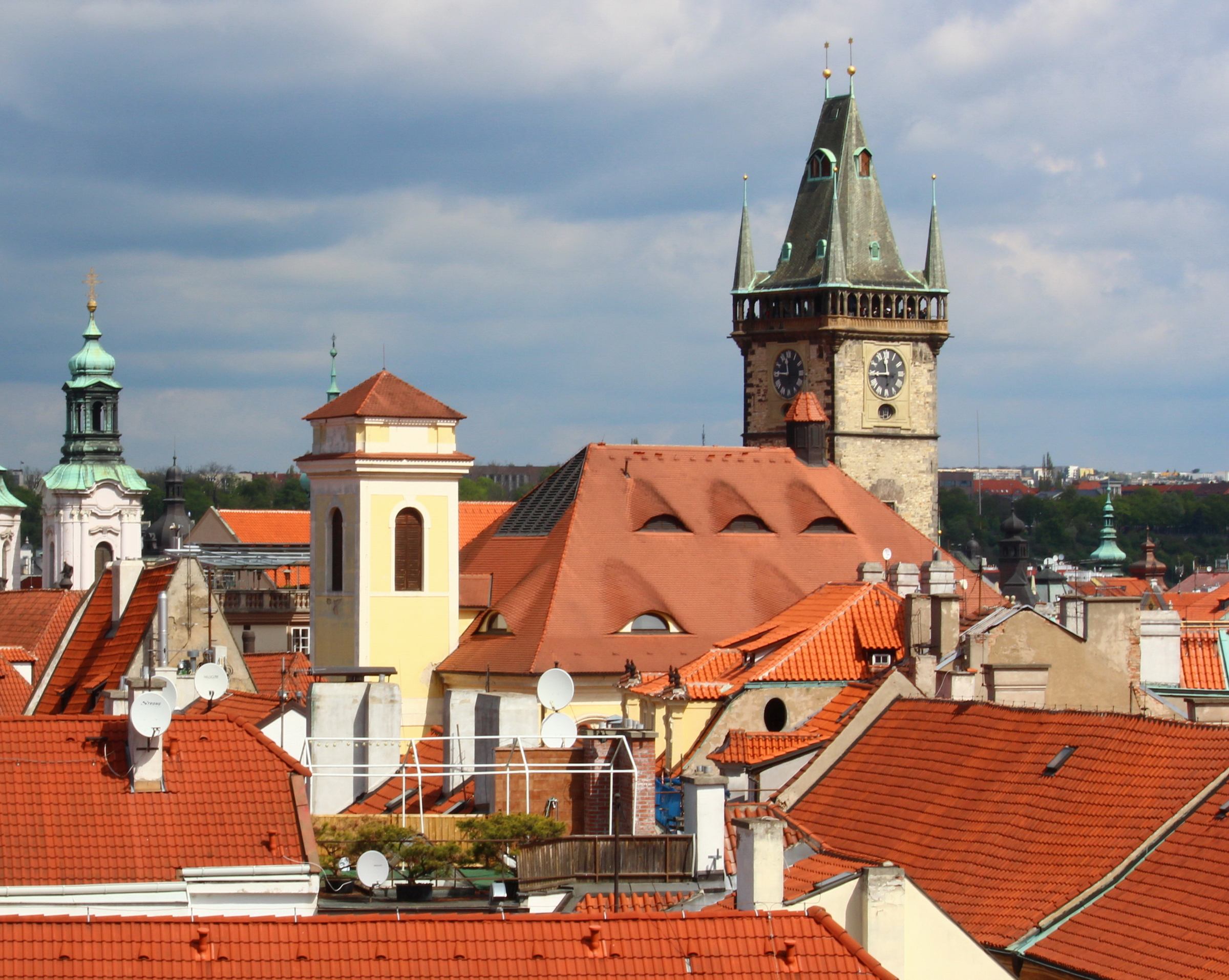 Praha - Staré Město, Kostel svatého Michaela archanděla, pohled od jihu.